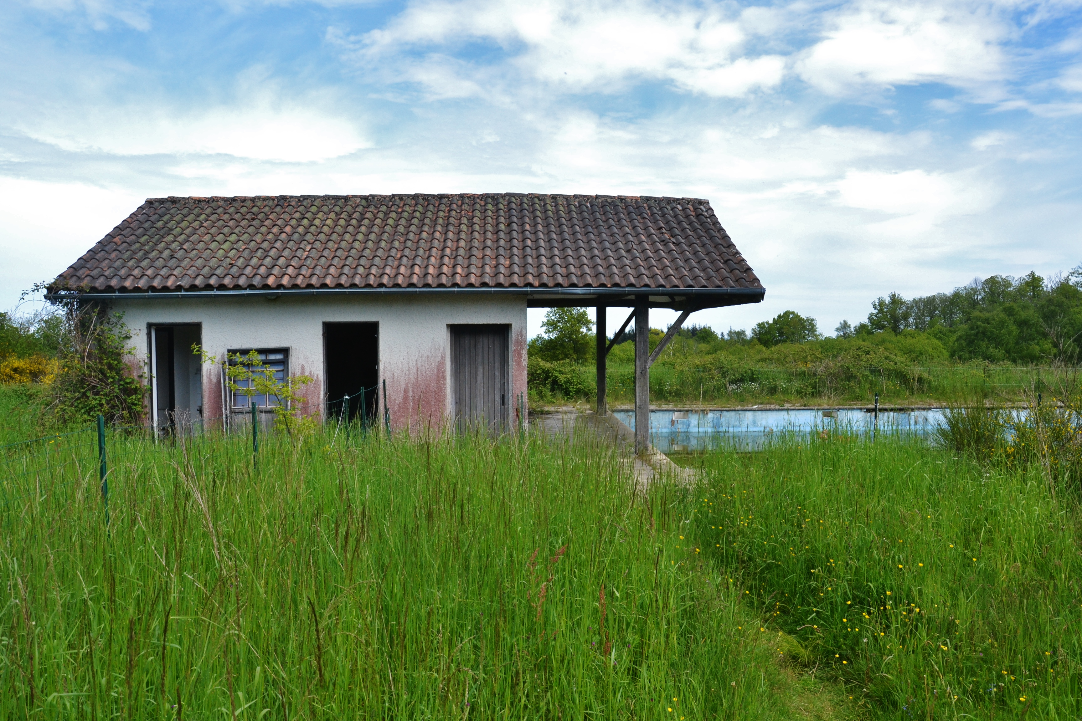 Le village abandonné de Courbefy (Bussière-Galant, Haute-Vienne, France)